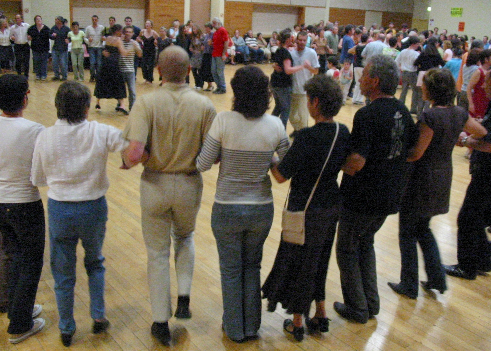 Fest noz à la Fête Mill Góll en Pays Gallo 2007